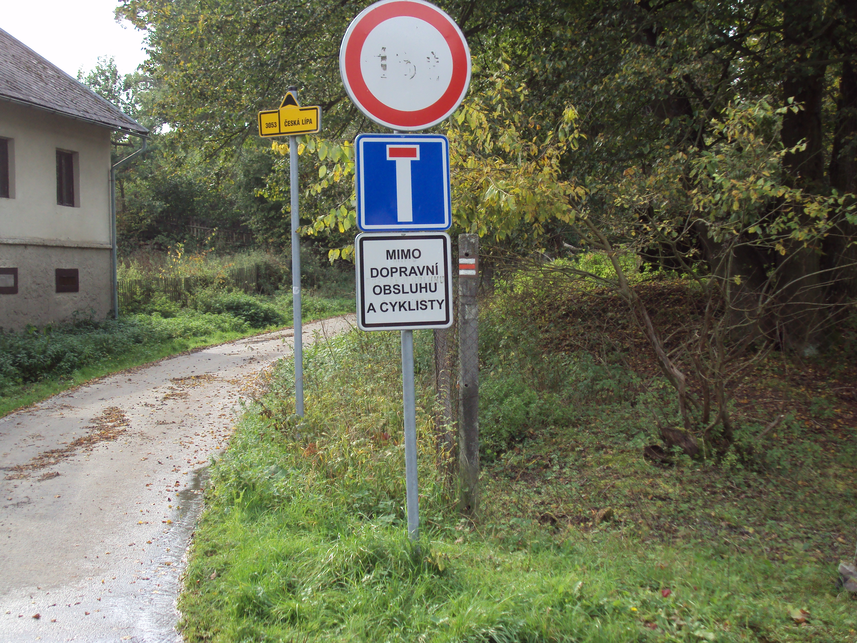 Začátek/Konec Cyklostezky Písečná v obci Písečná, cyklotrasa 3053